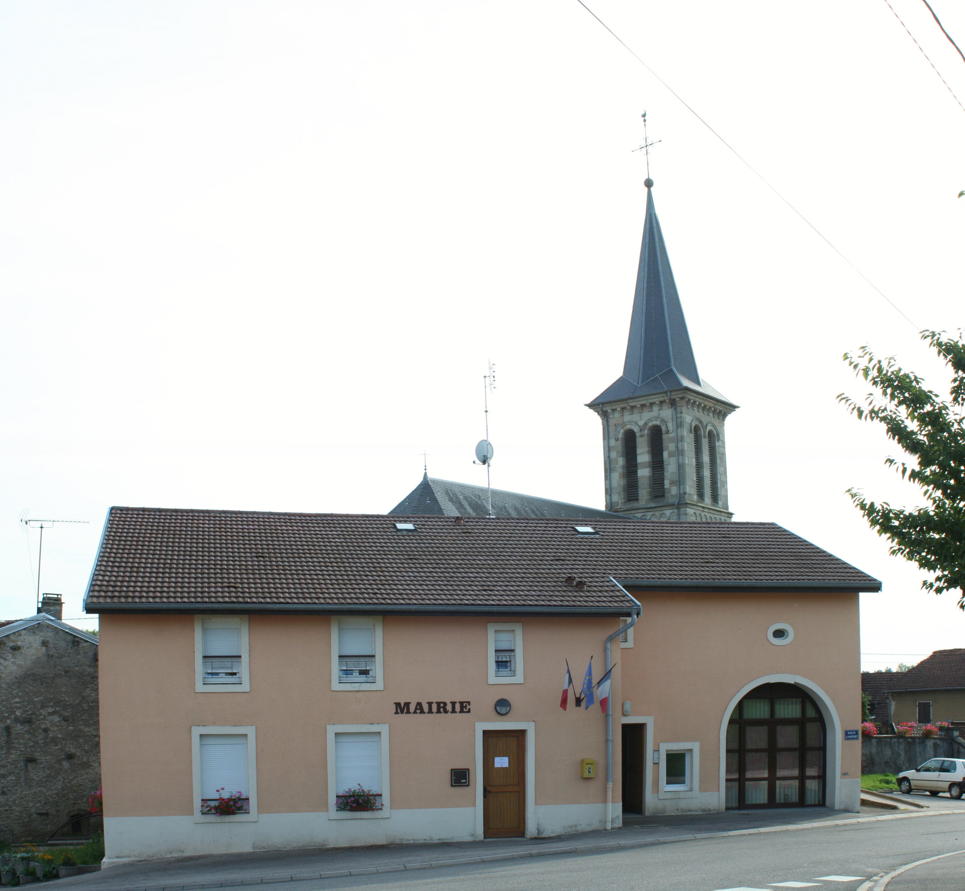 Mairie de Badménil-aux-Bois (Vosges)